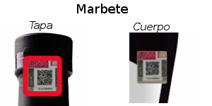 Marbete emitido por SHCP para botellas de bebidas alcohólicas.